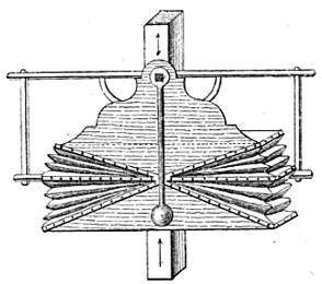 Ventilateur à soufflet décrit dans l'Encyclopédie ou Dictionnaire raisonné des sciences, des arts et des métiers de Diderot et d'Alembert En 1776 on voit appliquer en Angleterre le ventilateur à soufflet mû par un balancier et décrit dans le supplément de l'Encyclopédie Diderot et d'Alembert